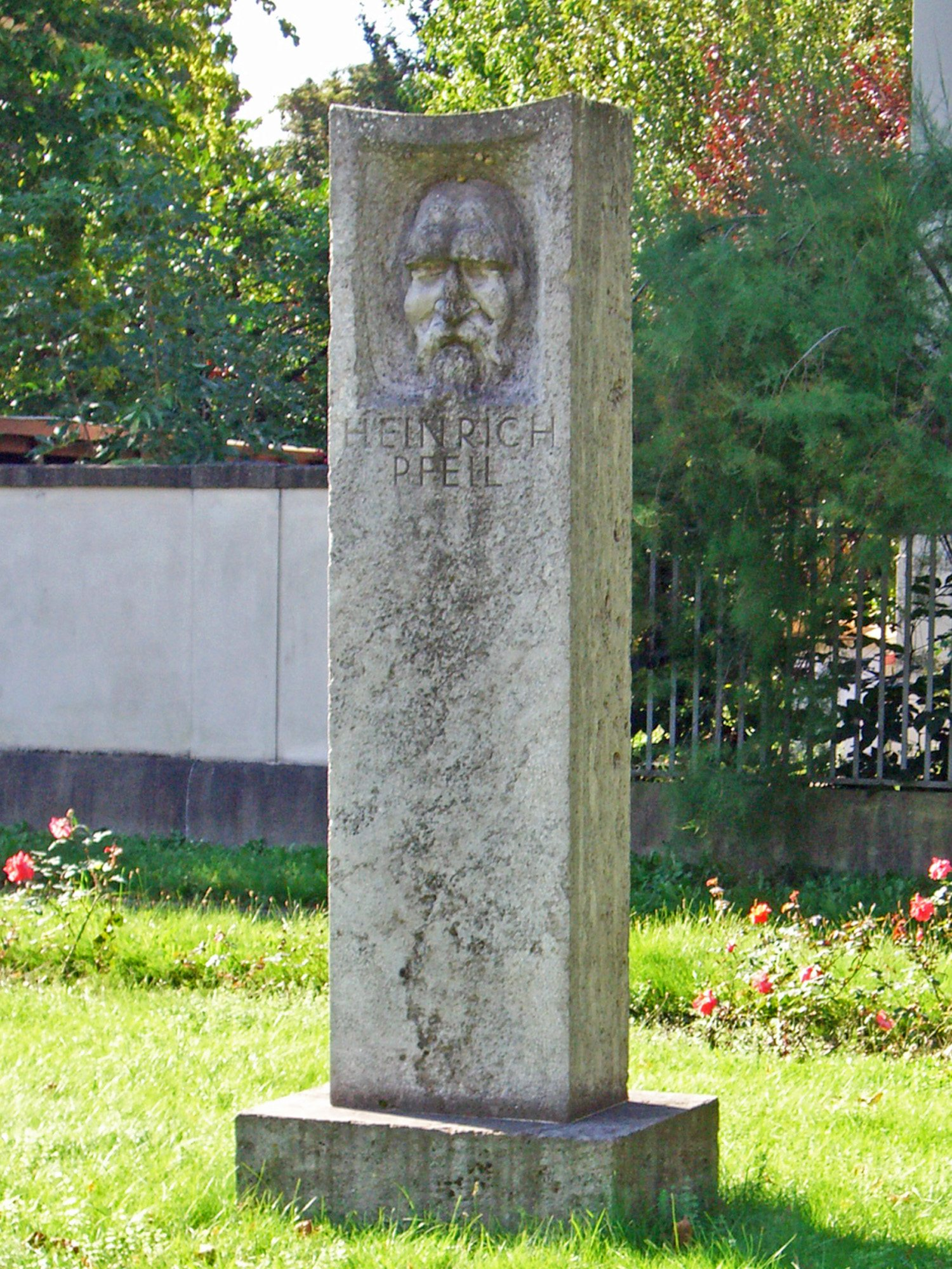 Denkmal für Heinrich Pfeil in Leipzig vor dem Grundstück Kickerlingsberg 19